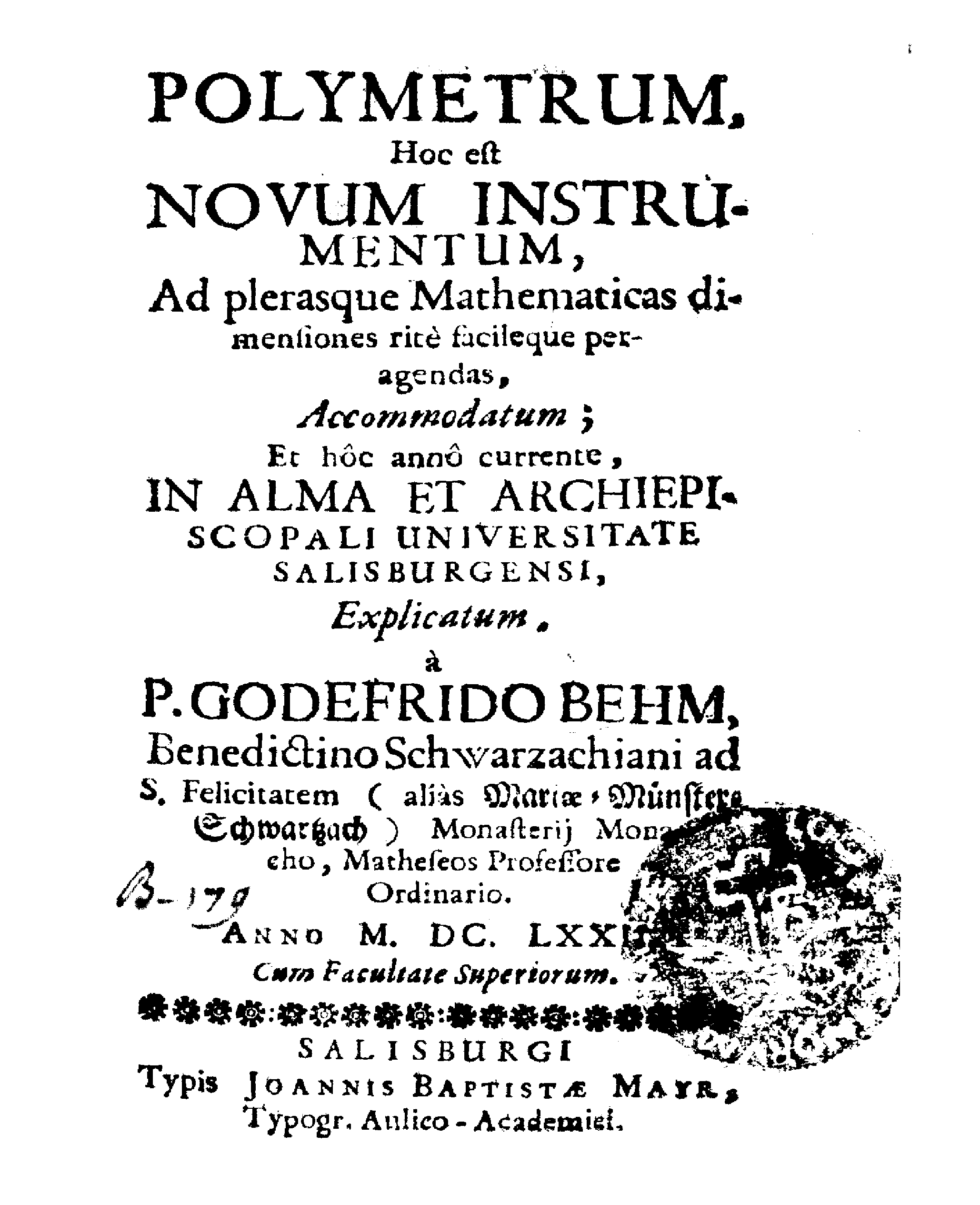 Polymetrum, hoc est novum instrumentum, ad plerasque mathematicas dimensiones ritè-facileque peragendas, accommodatum ... à p. Godefrido Behm Benedictino Schwarzachiani ad s. Felicitatem ... . - Salisburgi : typis Joannis Baptistae Mayr, typogr. aulieo-academici, 1672. - 110 p., [1] c. di tav. : ill. ; 8º .